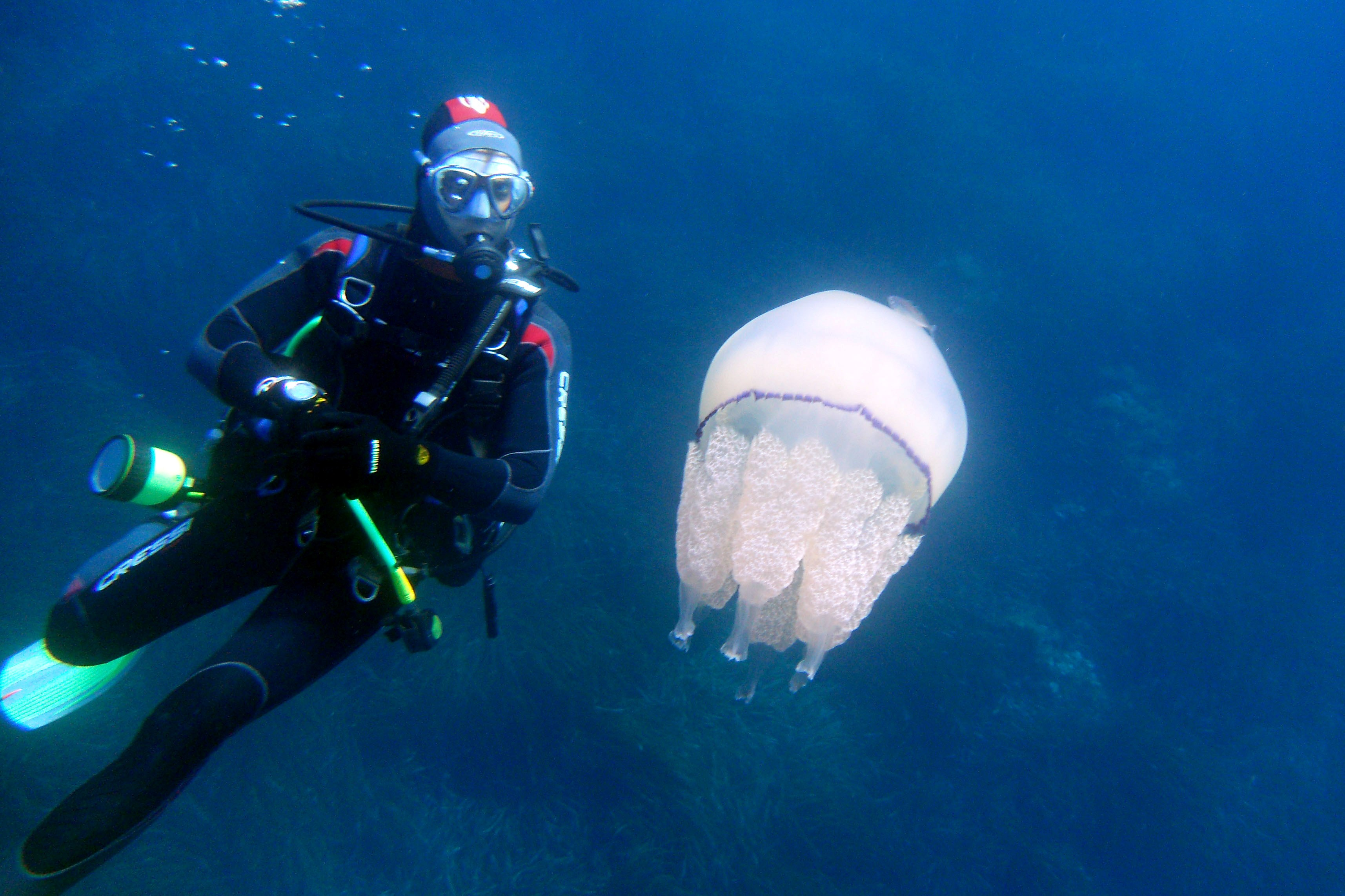 Rhizostoma pulmo Favignana, Sicily